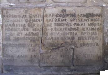 Roma , lapide di Vannozza Cattanei in san Marco.